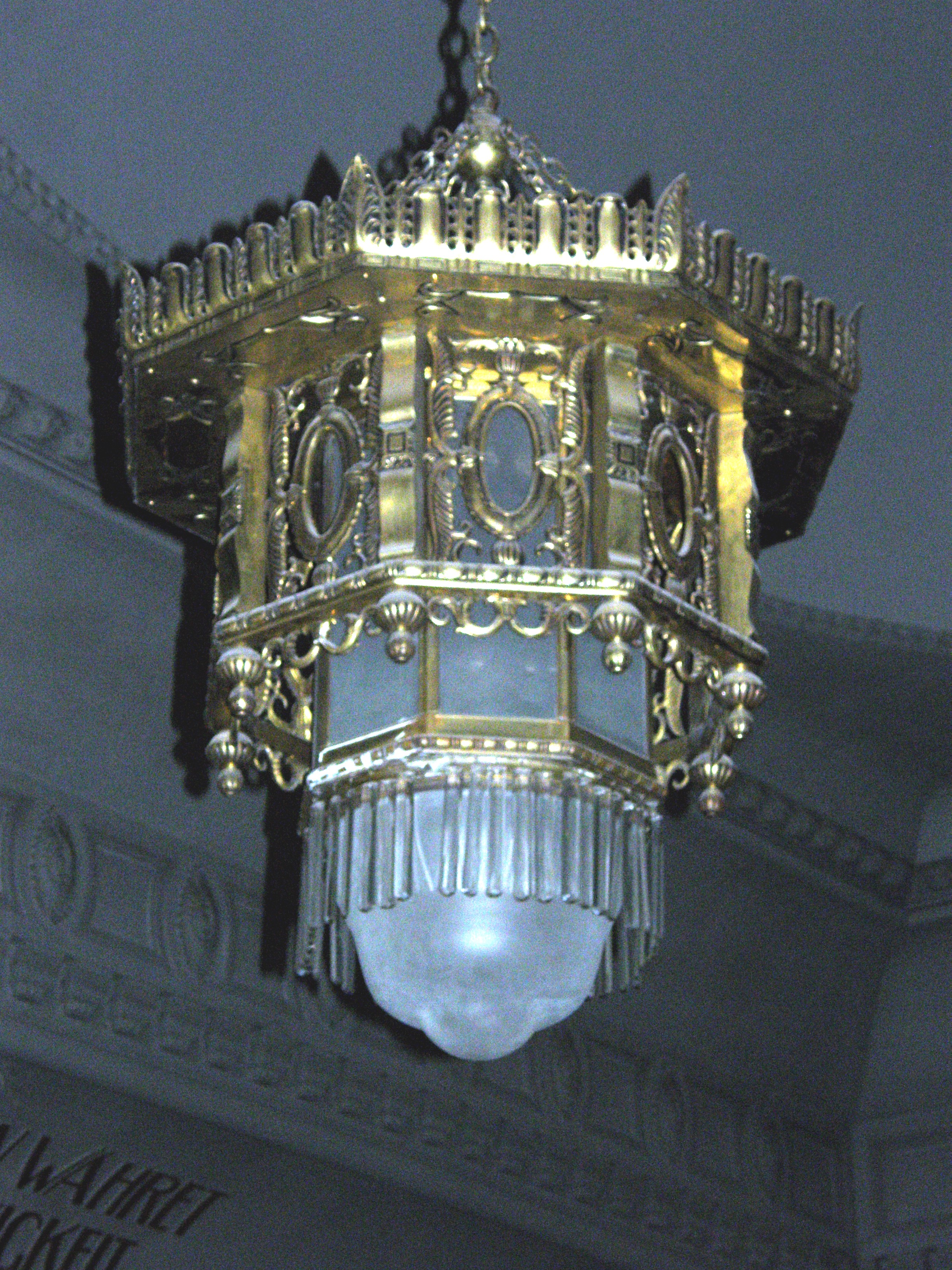 Friedenskirche in Aue-Zelle